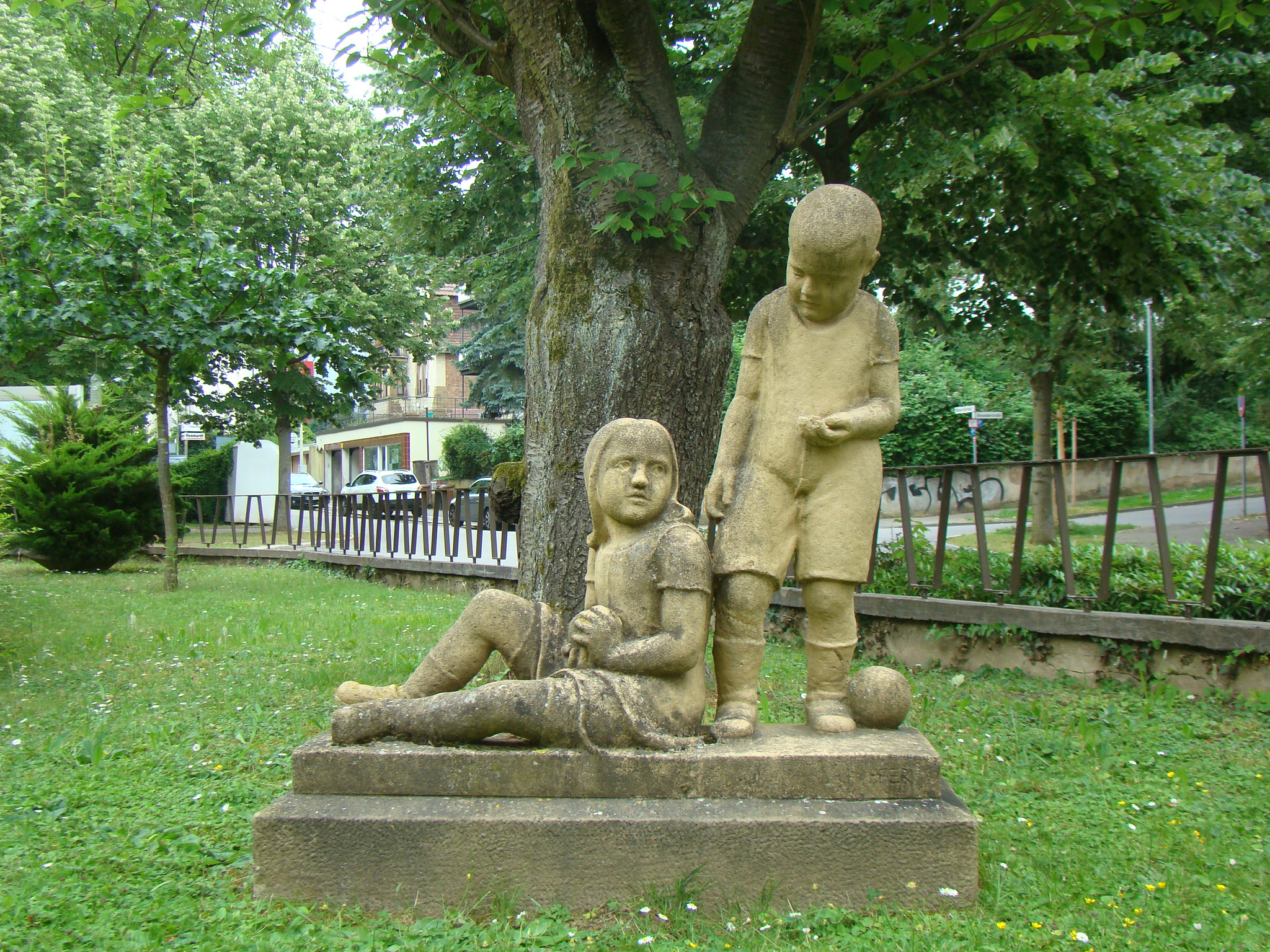 Figuren bei der Wichernkirche in Heilbronn